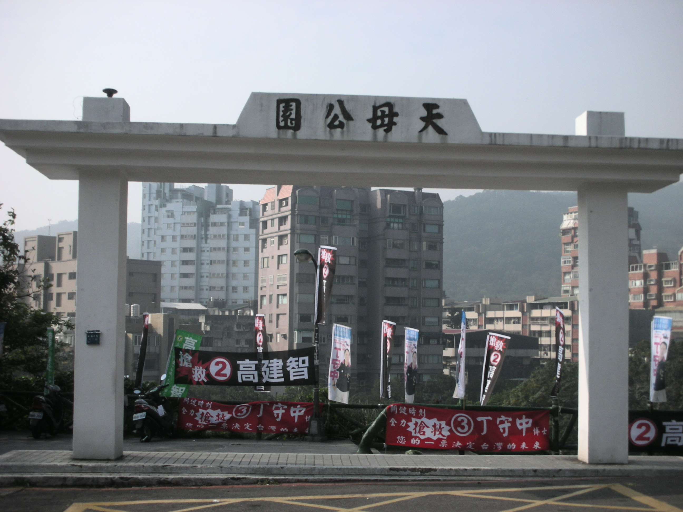 天母公園